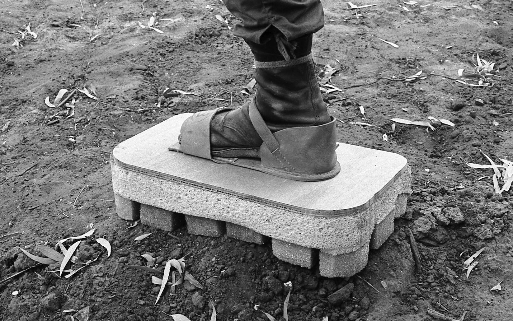 סנדלי חבלנים 1